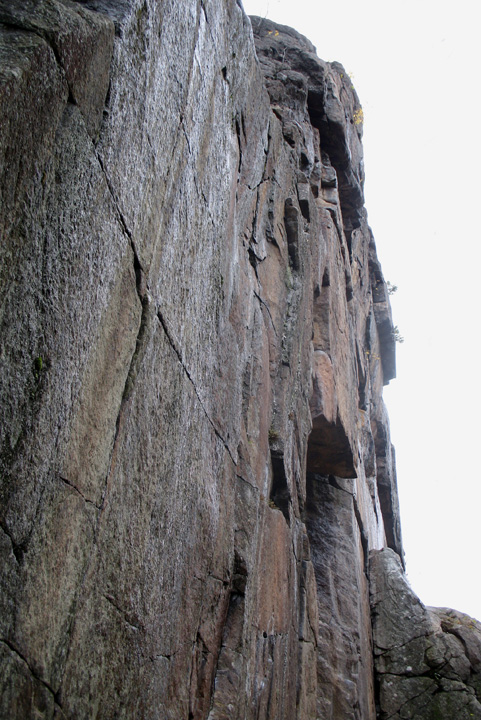 Forêt ancienne du Mont Wright, parc public de promenade et d'escalade à Stoneham-et-Tewkesbury au nord de la ville Québec dans région administrative de la Capitale-Nationale. Province de Québec, Canada.